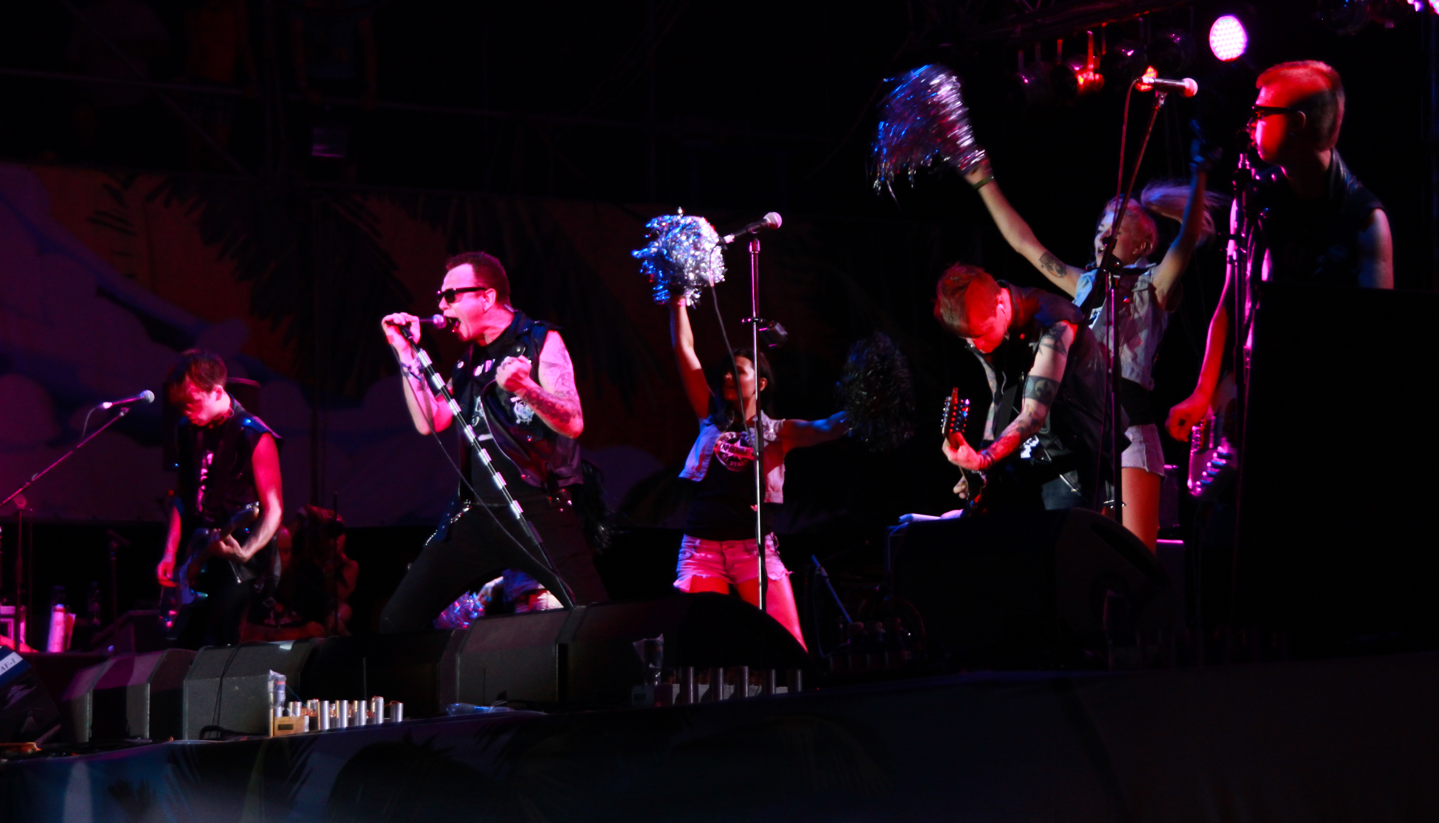 Выступление группы Тараканы! на фестивале Kubana в 2012 году.